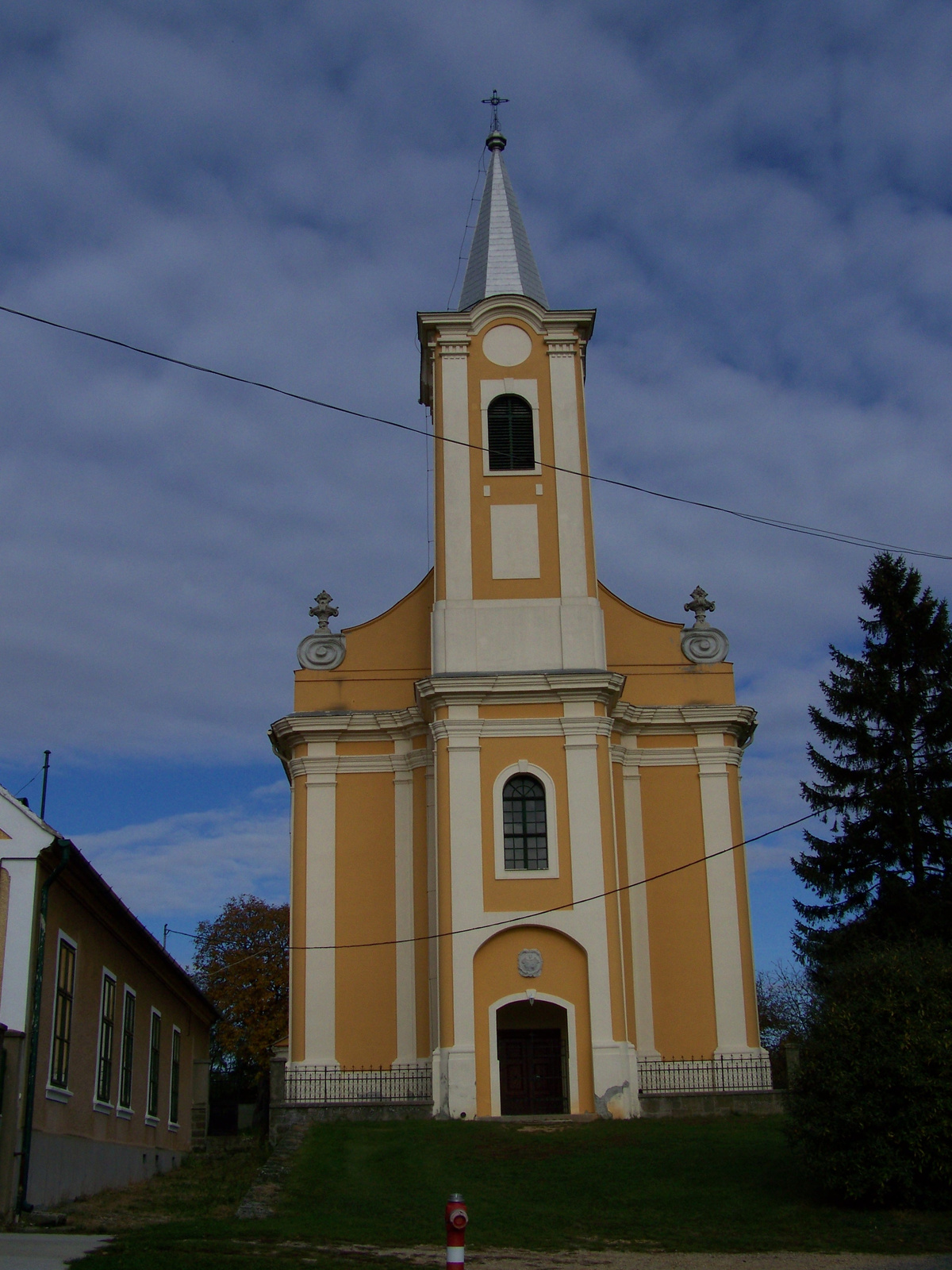 Szentháromság római katolikus templom (Sitke, (Nagysitke) Petőfi Sándor u. 24 .) This is a photo of a monument in Hungary. Identifier: 9321